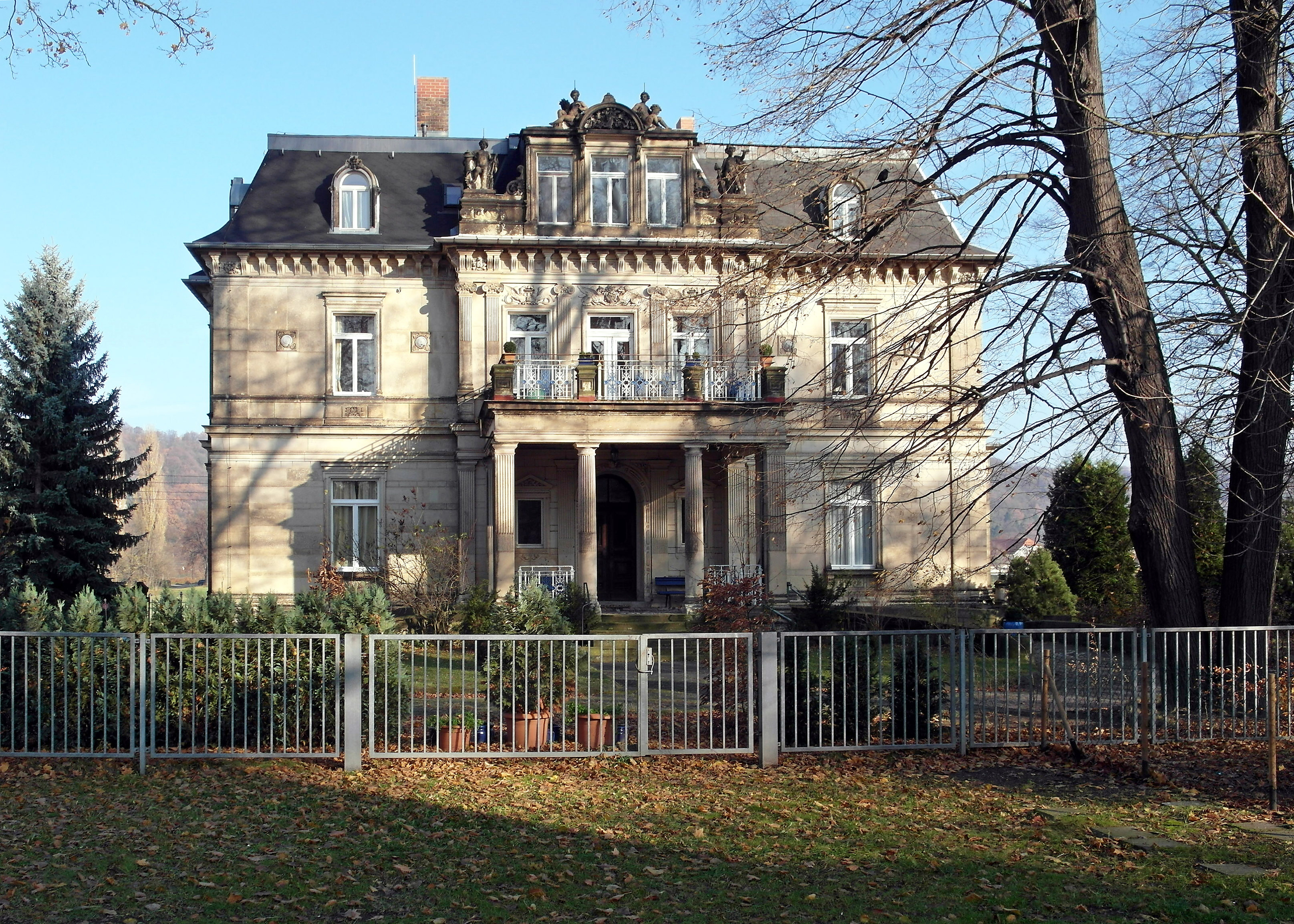 15.11.2012 01279 Dresden-Laubegast: Villa Hartmann (GMP: 51.021872,13.841880), Laubegaster Ufer 33. Von Hübner & Baron 1874-1877 für Lokomotivfabrikant Richard Hartmann in französischem Renaissancestil erbaut. Sicht von Süden. [SAM4771.JPG]20121115115DR.JPG(c)Blobelt